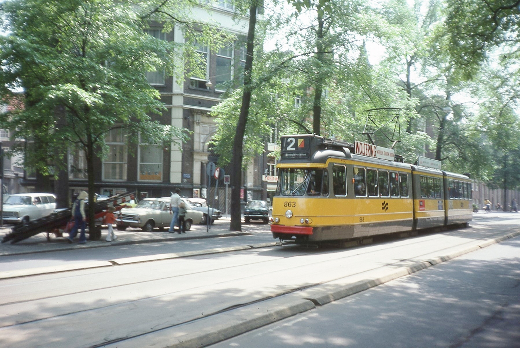 Photo. Trams aux Fils. Prise en juin 1976 Ligne 2 à Nieuwe Zijds Voorburgwal Tram 863